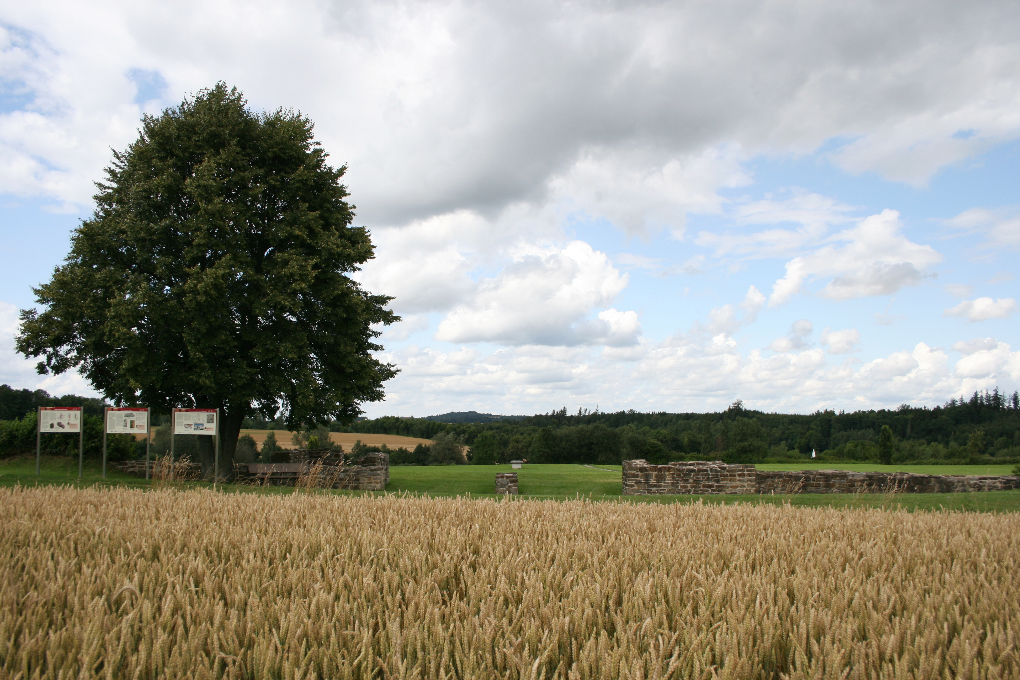 Kastell Buch, rekonstruiertes südliches Tor (porta principalis dextra), Außenansicht.